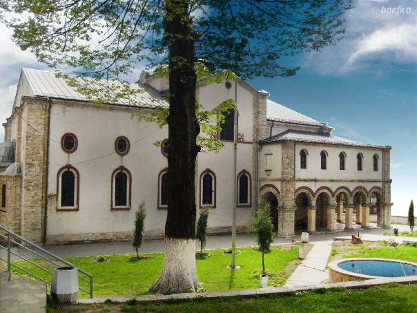 Соборен храм св.св.Кирил и Методиј во Тетово.